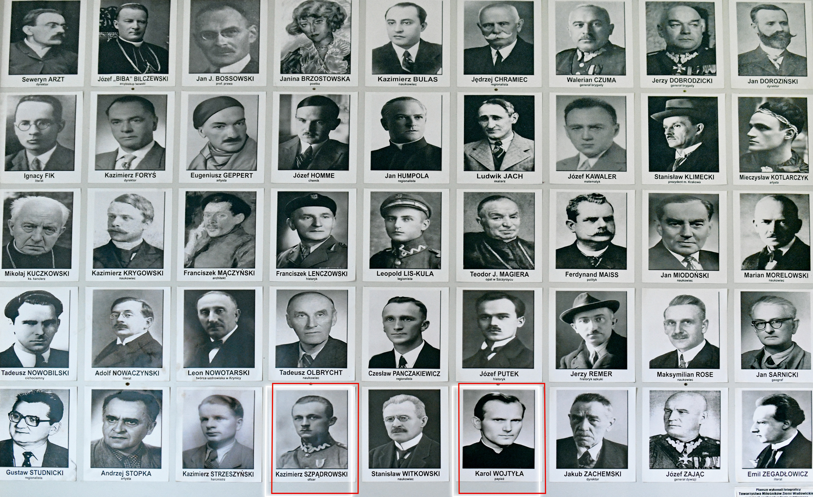 Najwybitniejsi absolwenci Gimnazjum im. Marcina Wadowity.